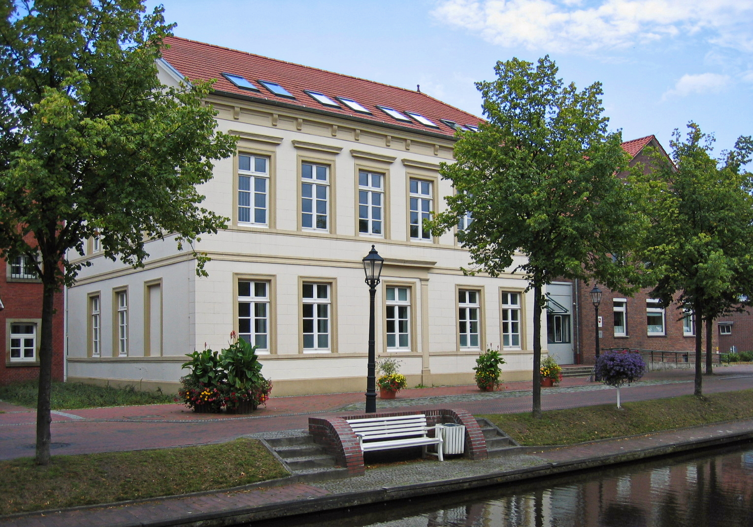 Amtsgericht Papenburg am Hauptkanal links in Papenburg.